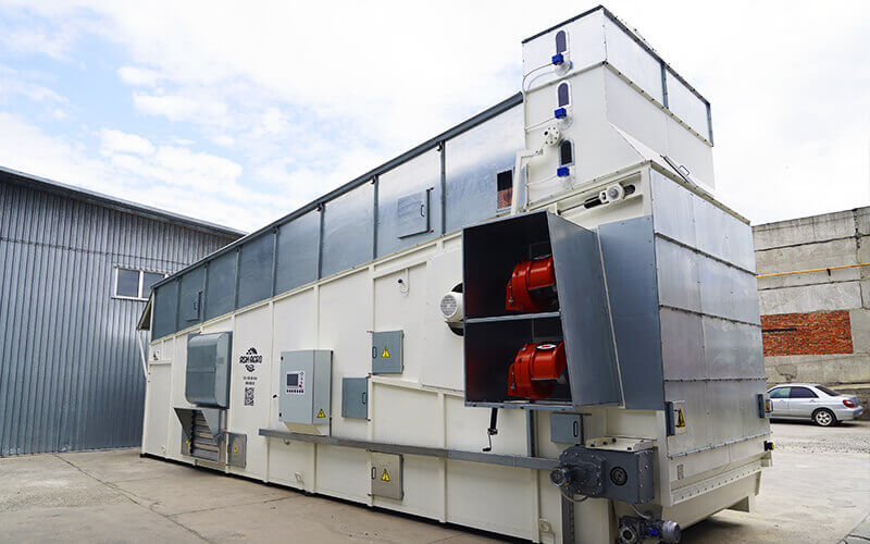 Конвейерная зерносушилка в профиль, завод конвейерных зерносушилок в Алтайском крае